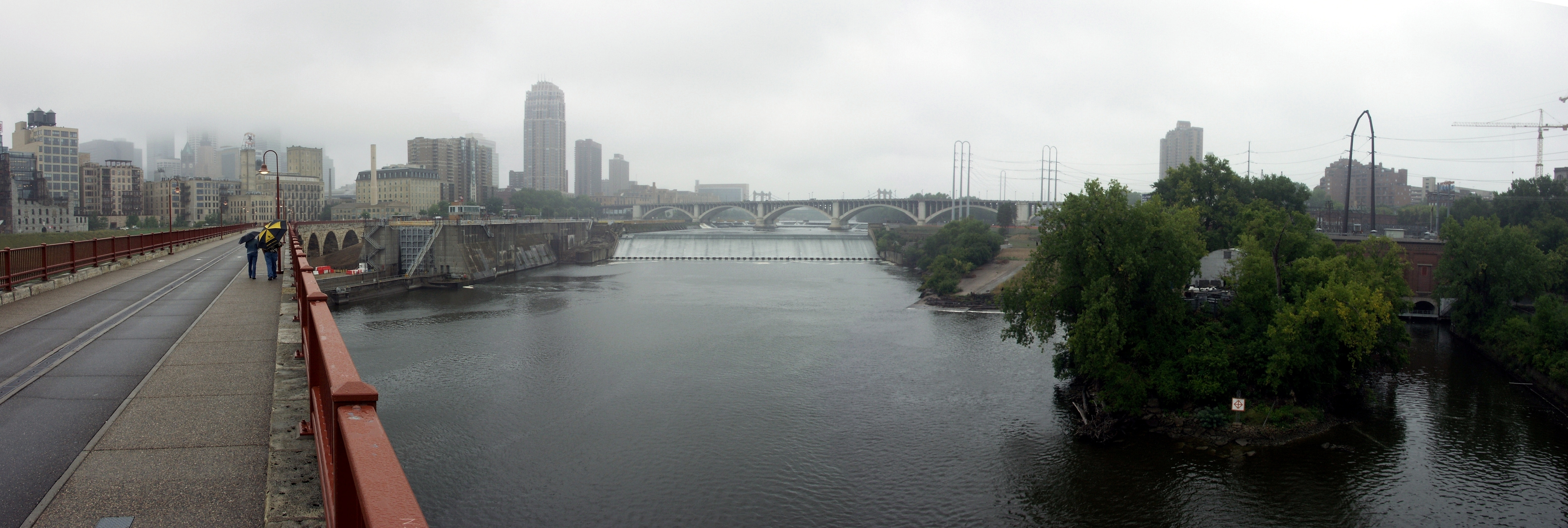 Der Mississippi in Minneapolis (Minnesota) (Panorama)